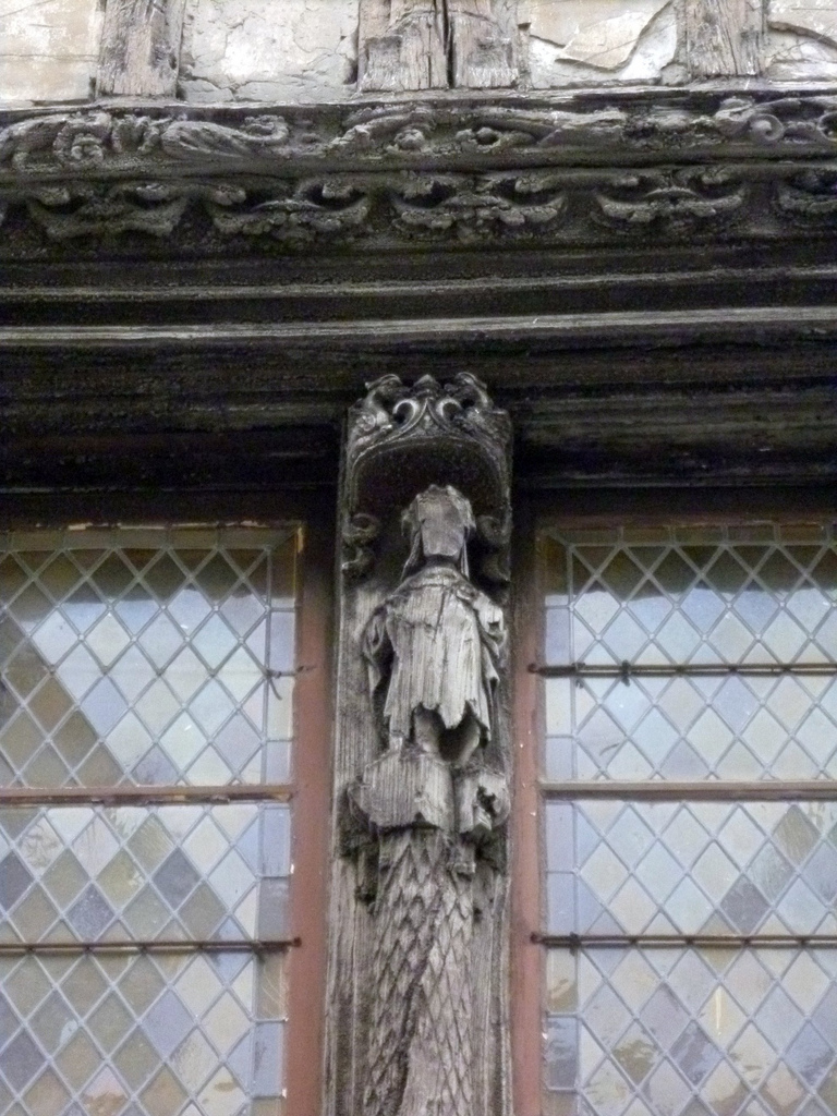 détail de la façade du 54 rue Saint-Pierre à Caen.